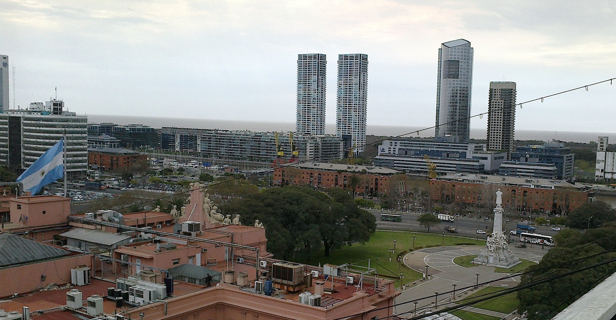 Vista desde el Ministerio de economía de la casa Rosada, Puerto Madero y Plaza Colón.